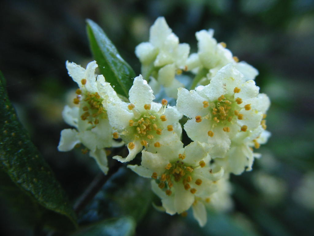 The protolog of "boldo" by Molina does not indicate dioecious species, however boldo if it is a dioecious diclino tree, as Gay and Reiche indicates, ie, trees with male flowers (male) other than trees with female flowers ( females). The inflorescences of trees females are smaller, less flowers than those of males and as far as I could see the trees trees females are more sparse cups, of smaller leaves and are more scarce than males, at least in northern distribution El protologo del "boldo" escrito por Molina no indica dioecia de la especie, sin embargo el boldo si es un árbol diclino dioico, como indica Gay y Reiche, es decir, árboles con flores masculinas (machos) distintos de árboles con flores femeninas (hembras). Las inflorescencias de los árboles hembras son mas pequeñas, de menos flores que las de los árboles machos y hasta donde he podido ver los árboles hembras son de copas mas ralas, de hojas mas pequeñas y son mas escasos que los machos, por lo menos en la zona norte de distribución